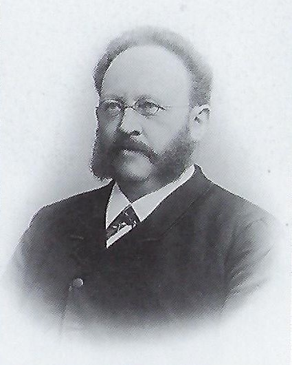 Porträtfotografie des Wasserbauingenieurs Theodor Hoebel (1832–1908), Erbauer des Fischereihafens in Geestemünde.